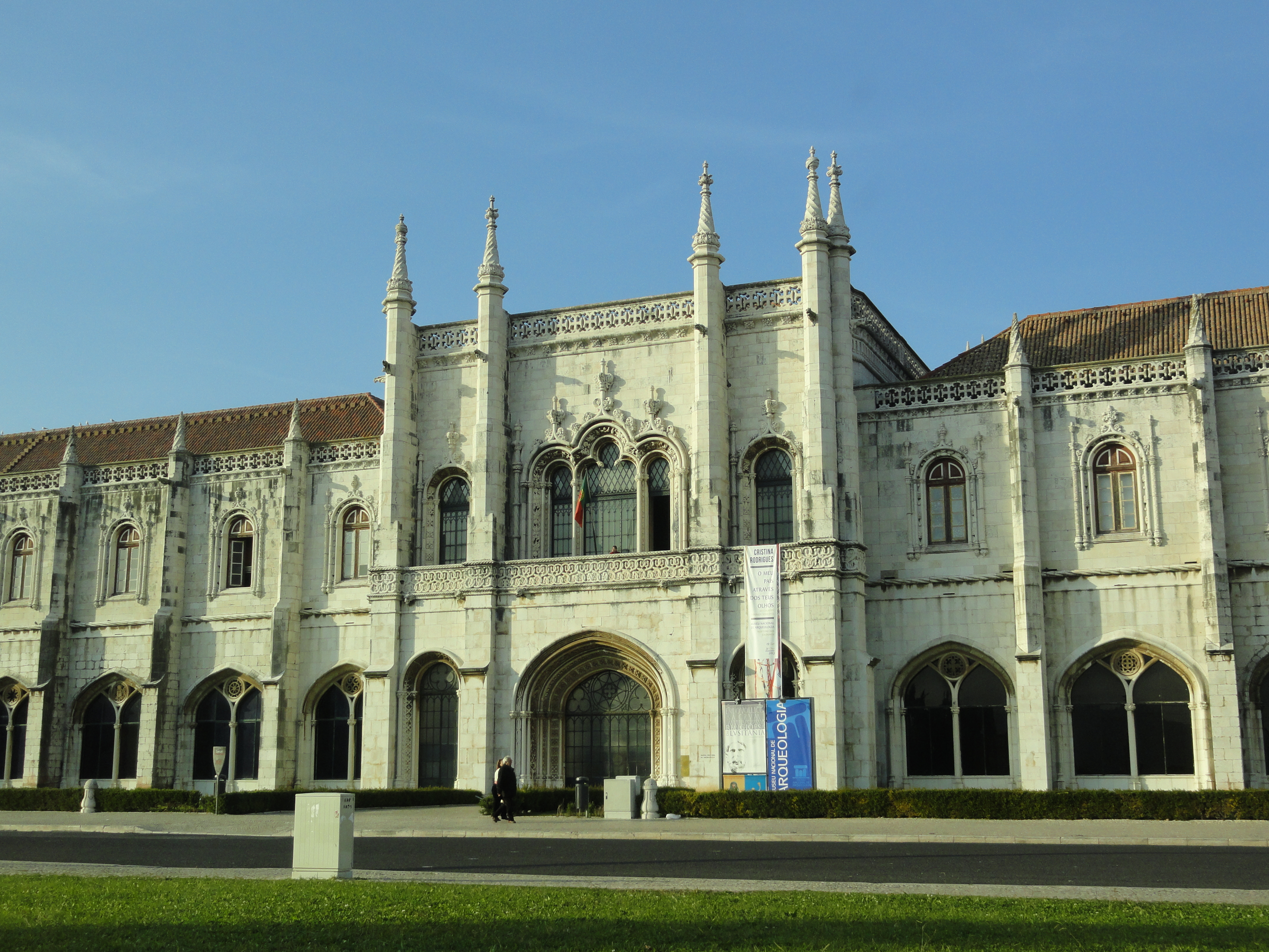 Museu Nacional de Arqueologia